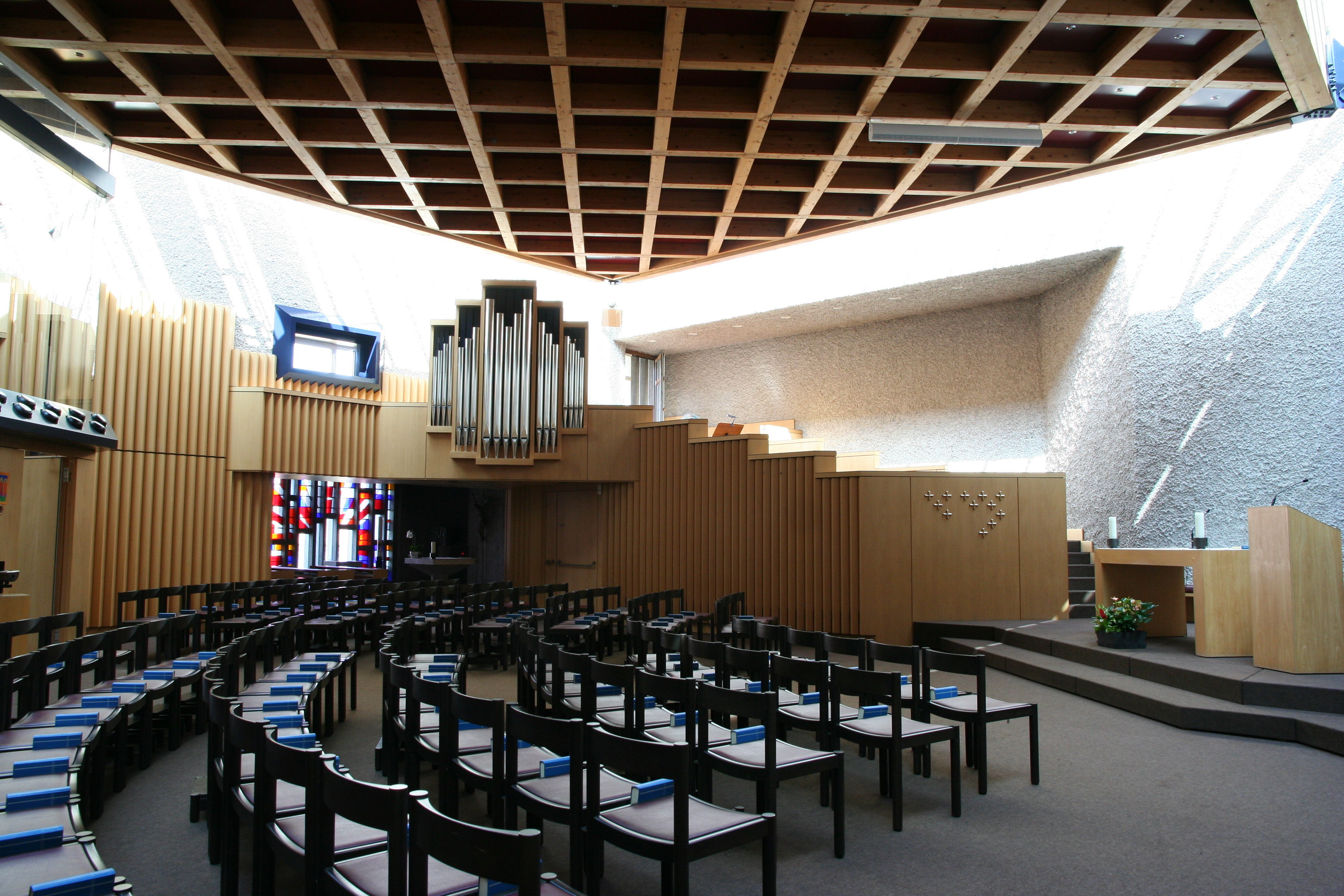 Römisch-katholische Kirche St. Agnes Erlenbach ZH